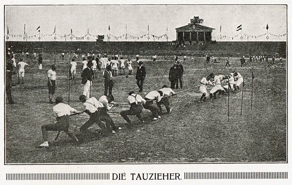 Deutsches Turnfest 1913 in Leipzig, Wettbewerb im Tauziehen